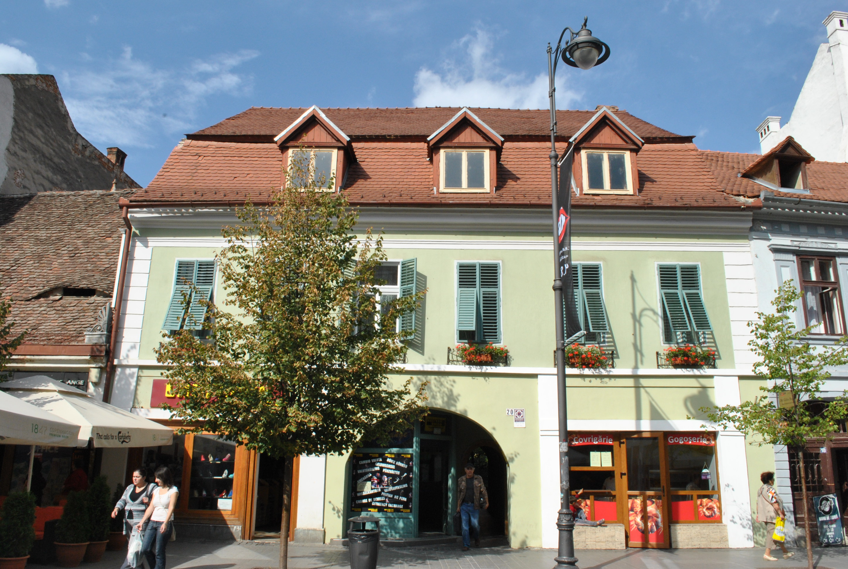 Casă, sf. sec. XVIII, cu fragmente sec. XV - XVI